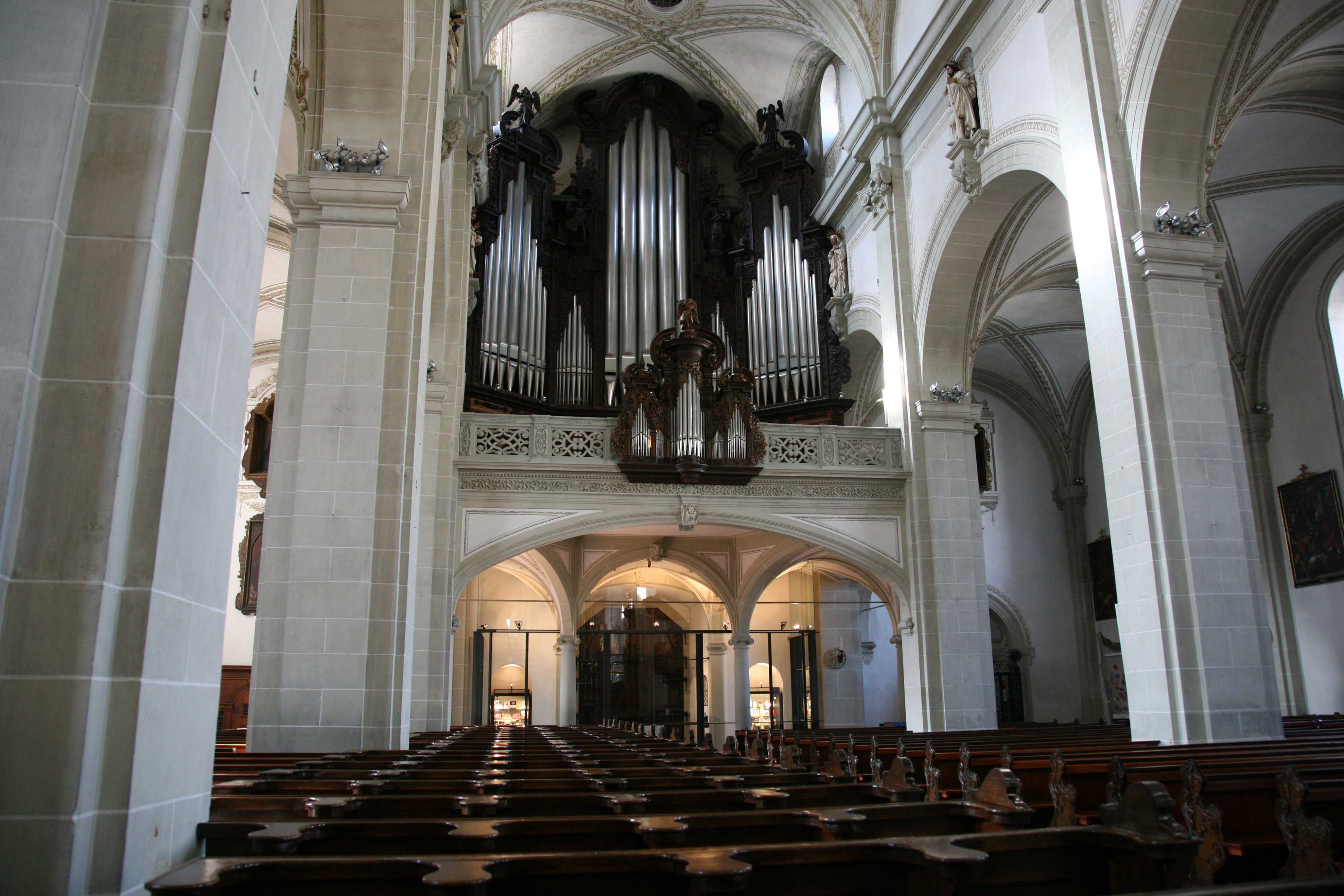 Innenaufnahme Hofkirche mit Blick gegen hinten